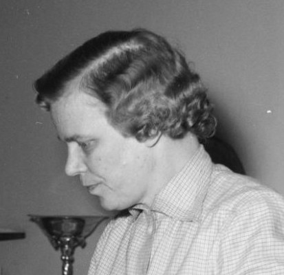 Op bezoek bij minister Lis Groes en haar gezin. Lis Groes zittend aan tafel met haar gezin. Anne Lisbeth Groes was van 1953 tot 1955 minister van handel in het kabinet Hedtoft II